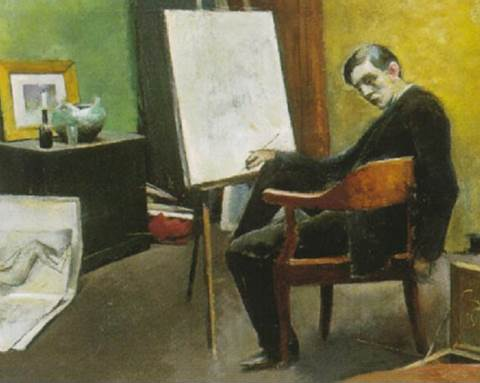 Kunstmaler hinter Staffelei